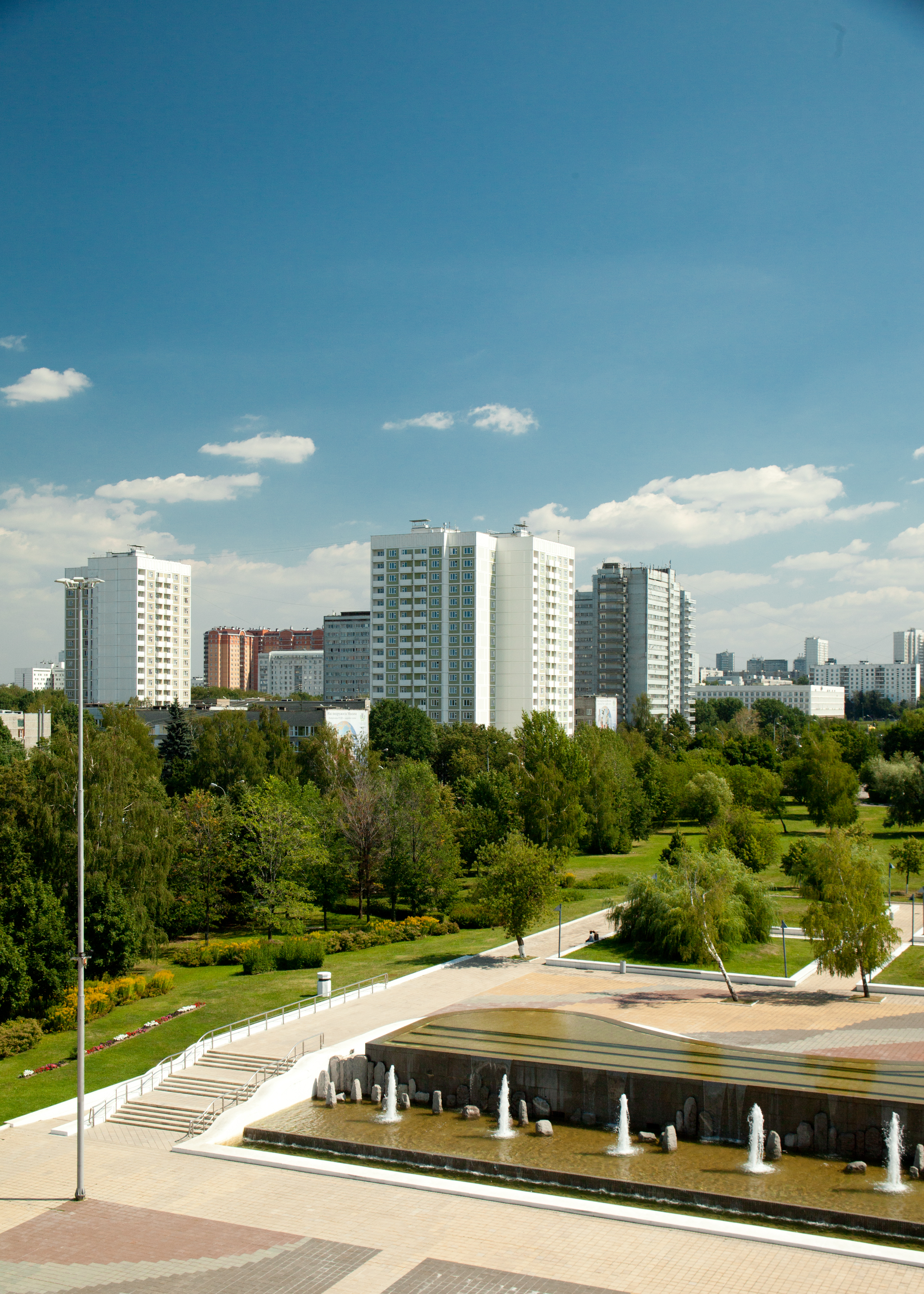 Вид на Студенческий городок